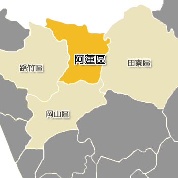 阿蓮區相對位置